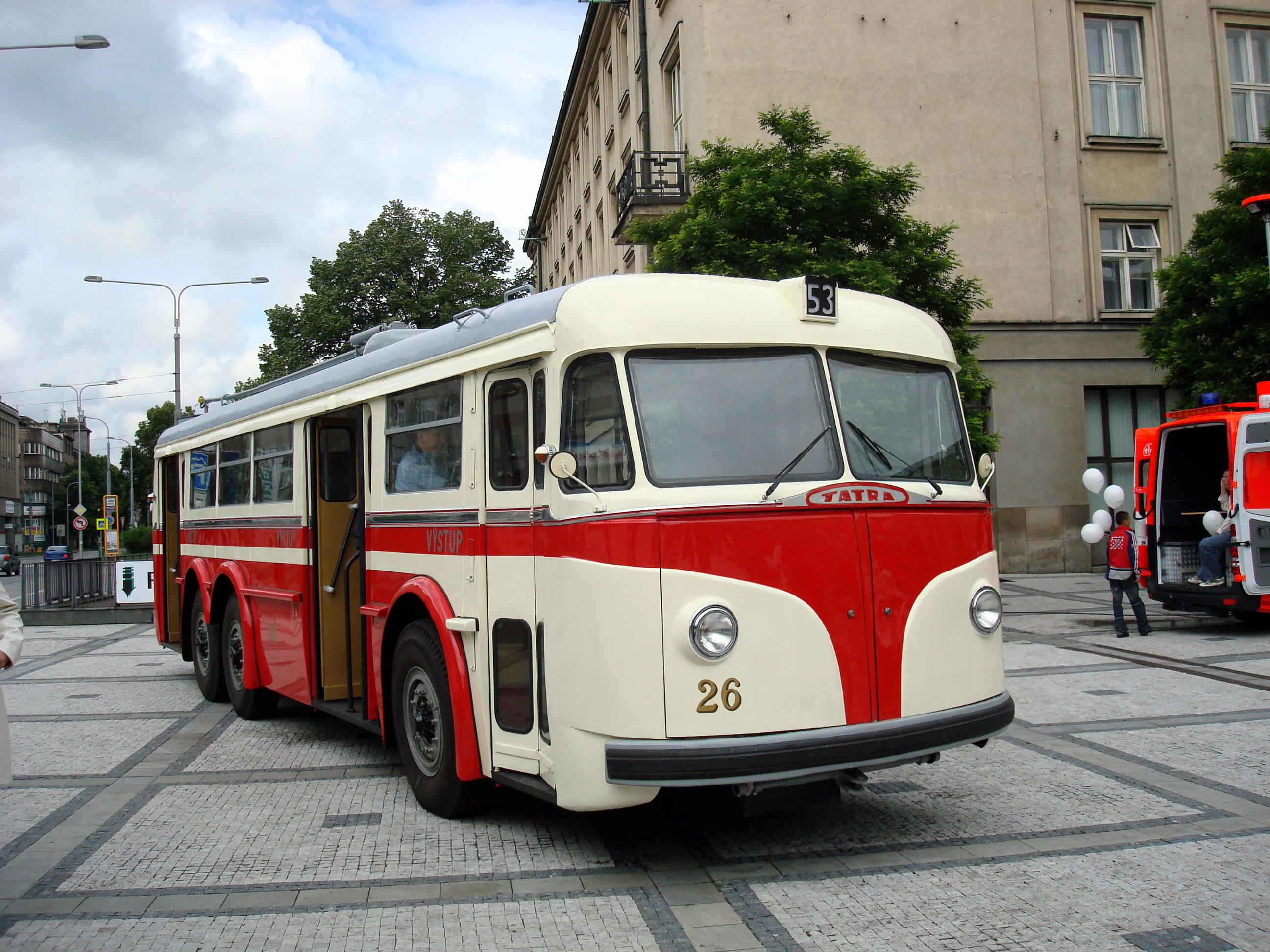 Historický trolejbus Tatra T 400 v Ostravě